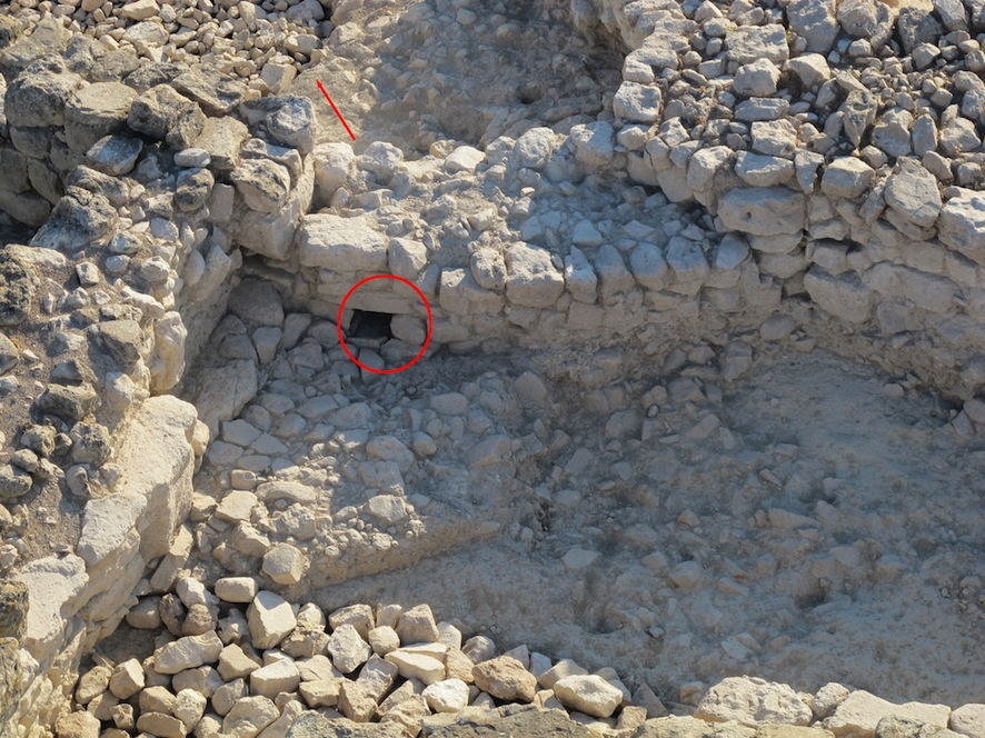 Estructura de recollida d'aigües pluvials, dels carrerons del Son Fornés Clàssic.